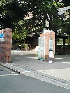 Porten till Shinjuku-campuset Bild från japanska Wikipedia, 目白大学 画像:Mejirouniv.jpg